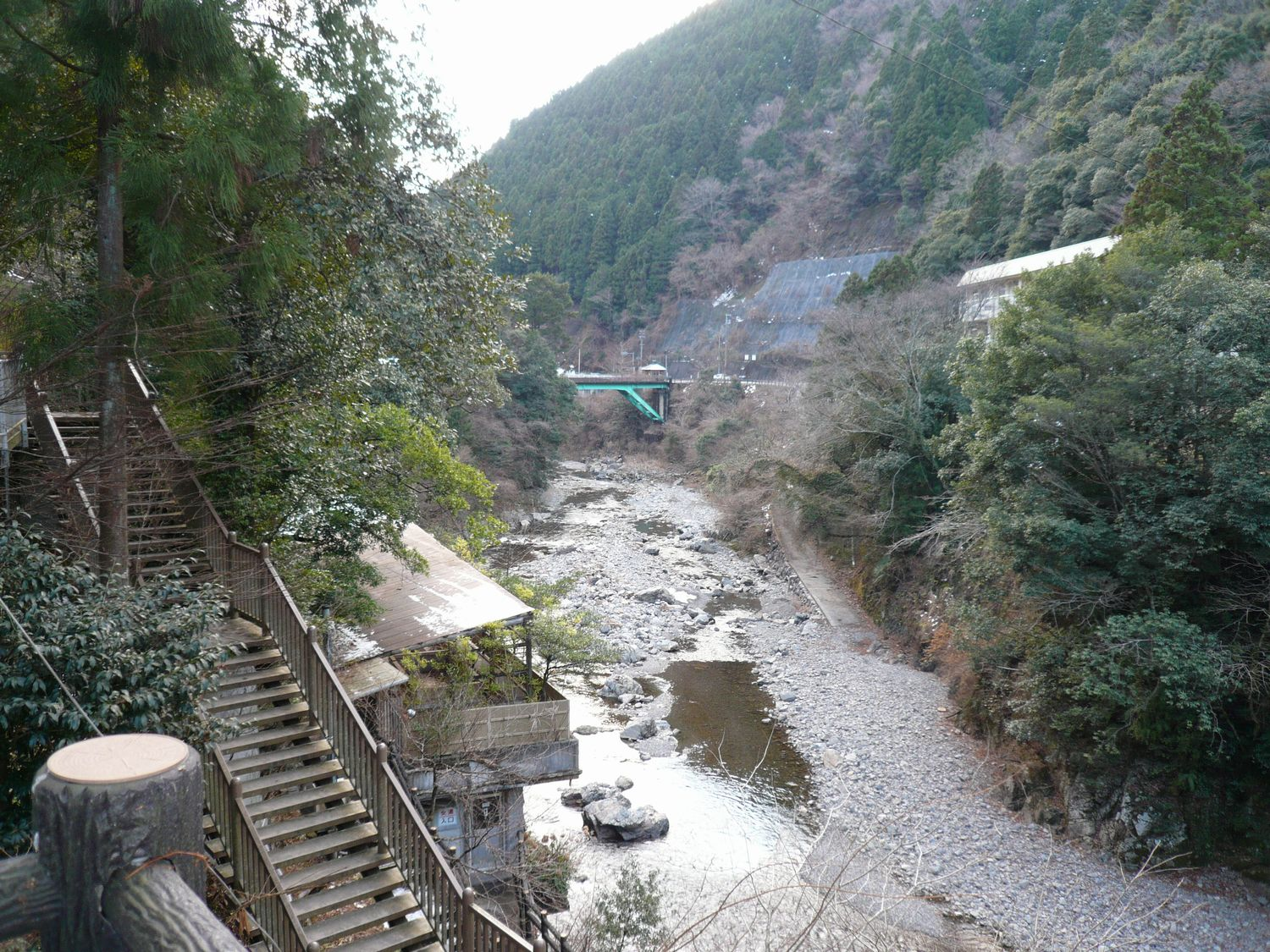 龍神温泉（Ryujin Onsen）